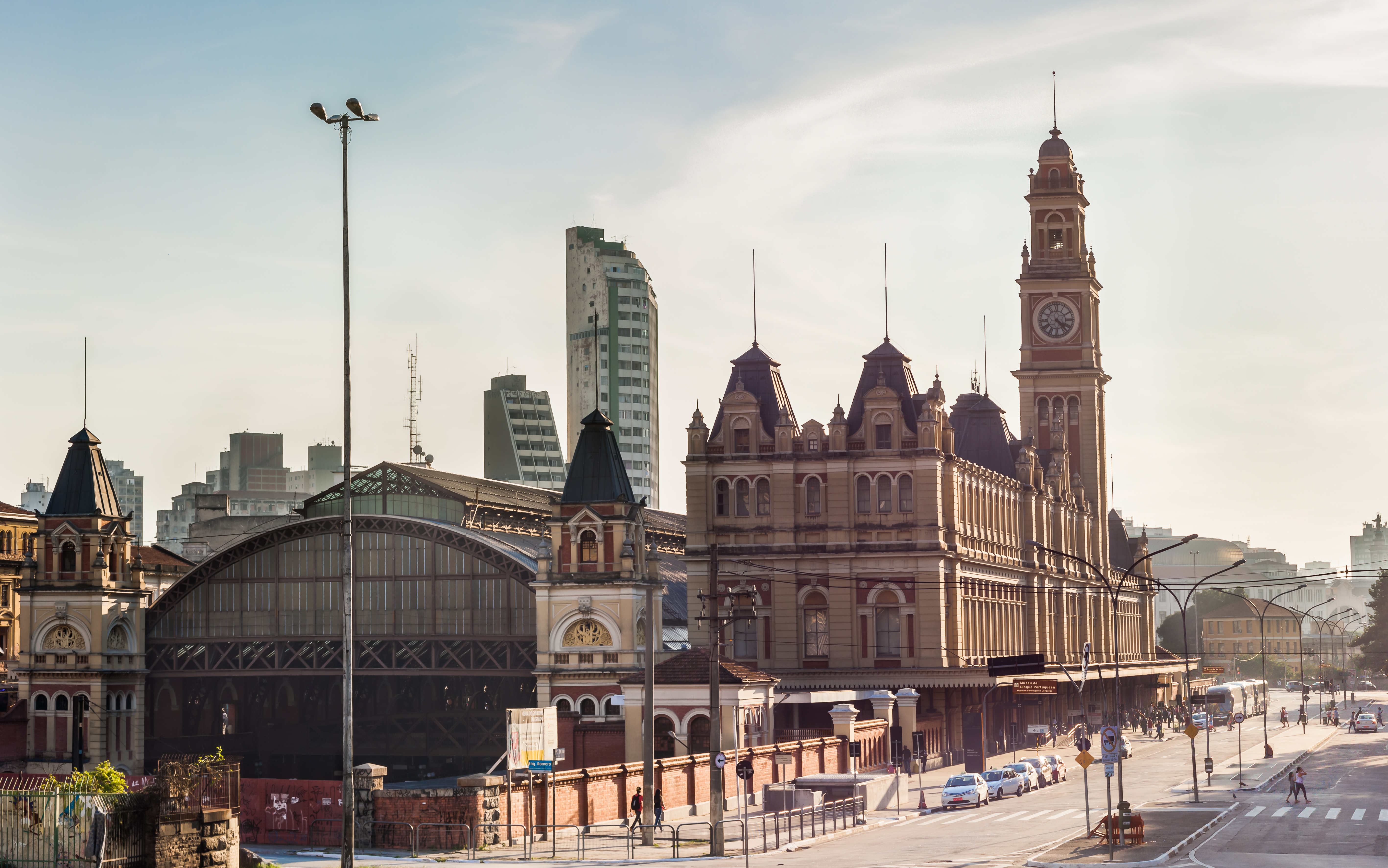 Estação da Luz no centro de São Paulo, Brasil.